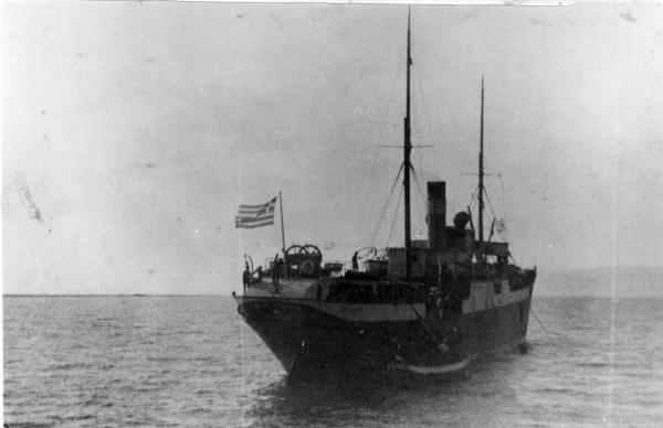 אוניית אף-על-פי בדרכה לארץ-ישראל נושאת דגל יוון.